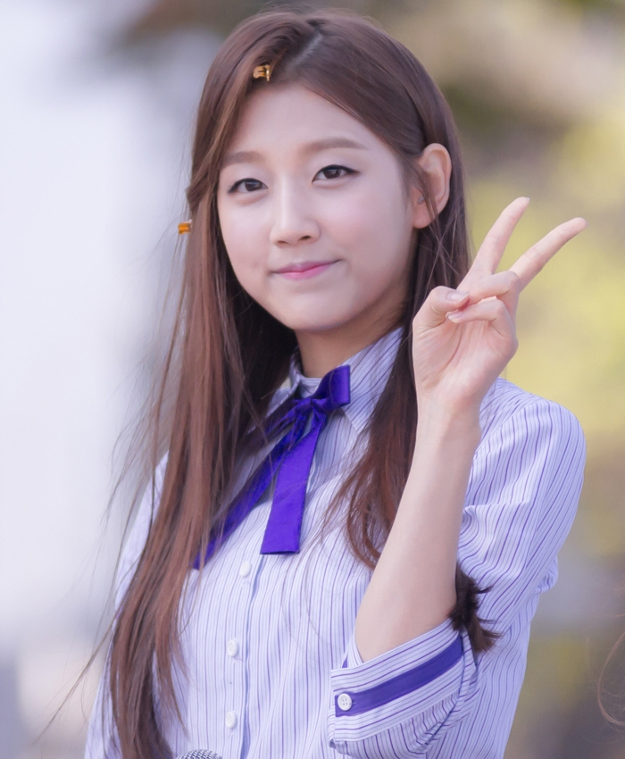 151024 러블리즈 음악중심 미니팬미팅 - 01